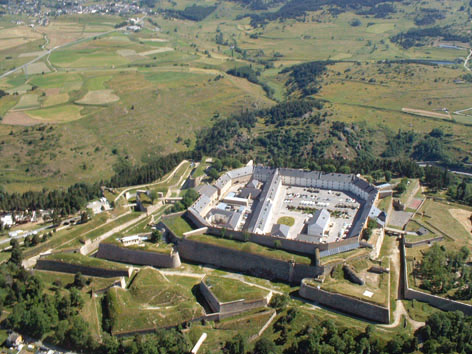 Mont-Louis, vue aérienne de la citadelle créée par Vauban